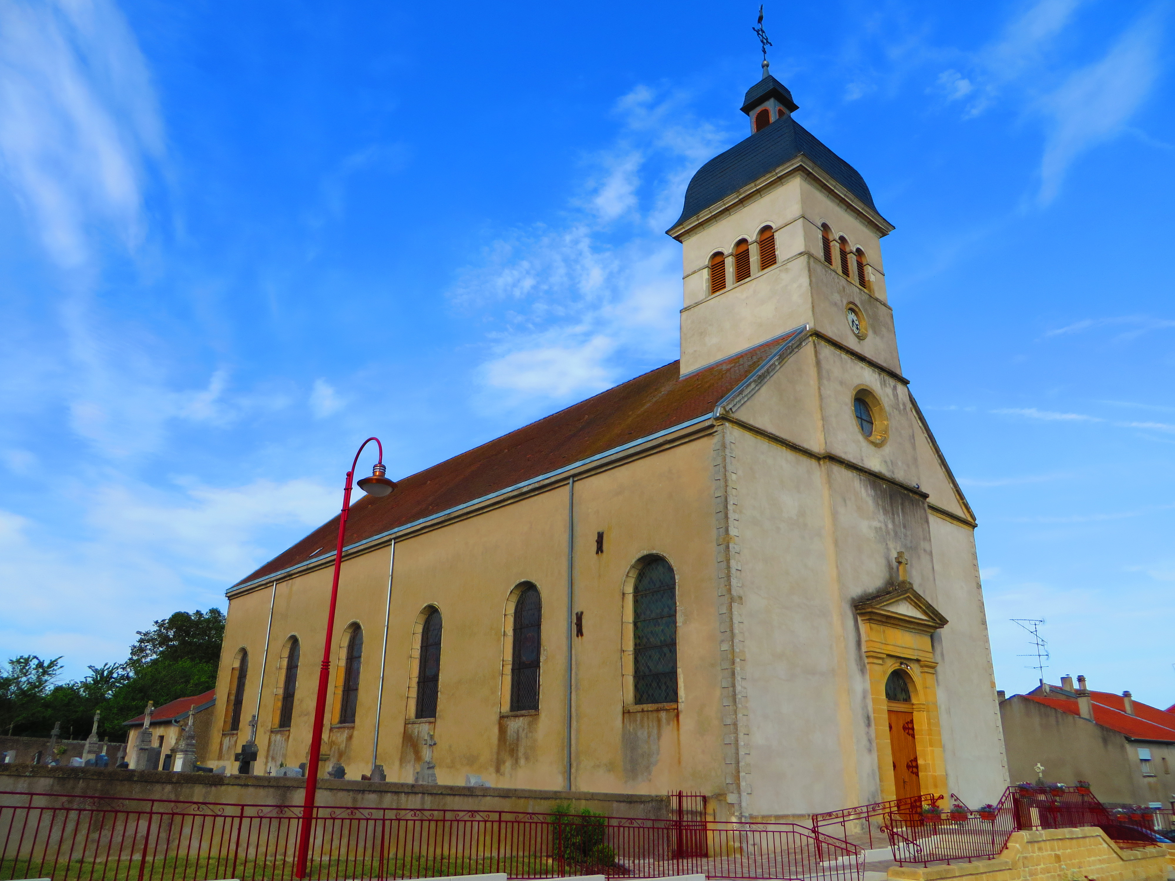 Herny eglise